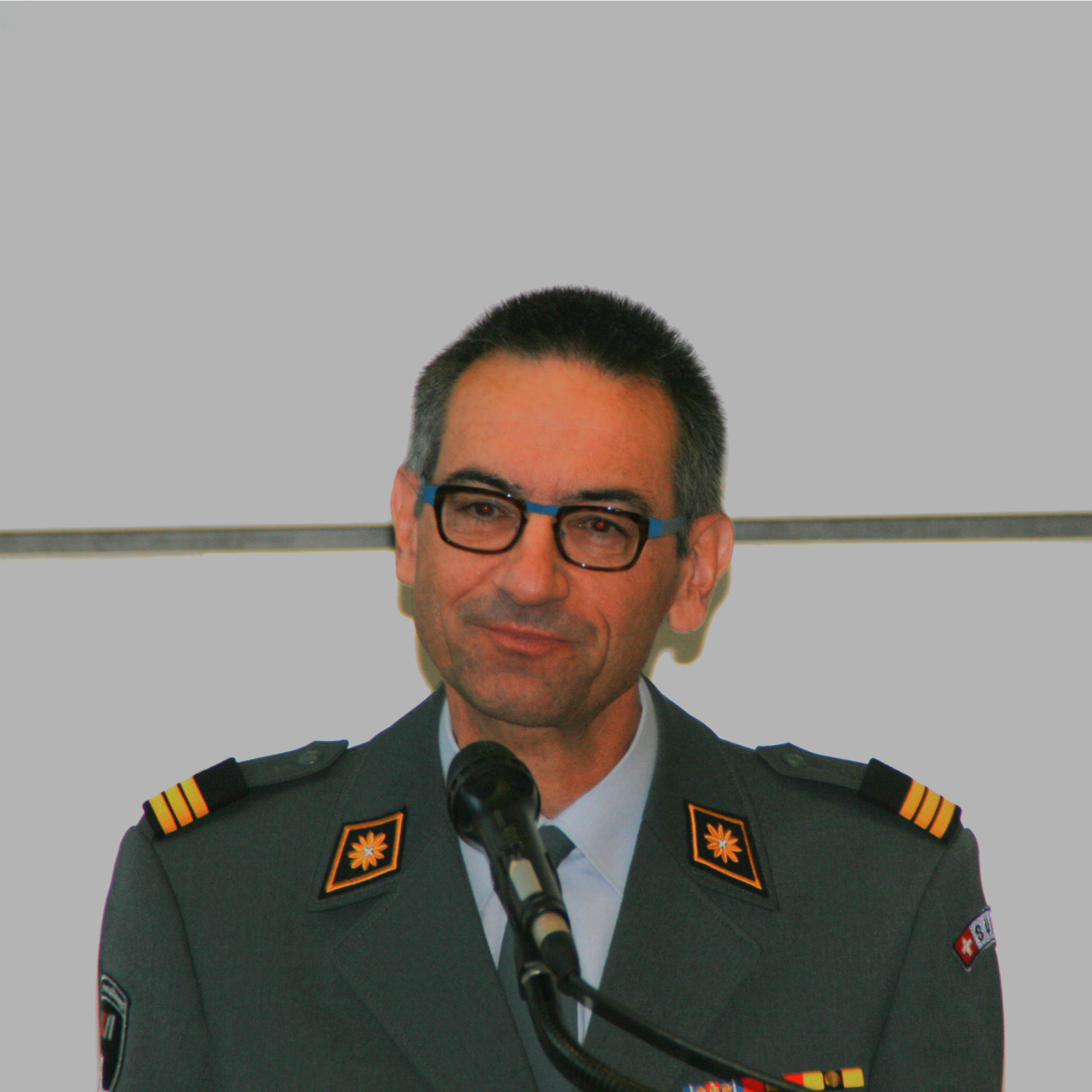 Stefan Holenstein während der SOGART Herbsttage 2017